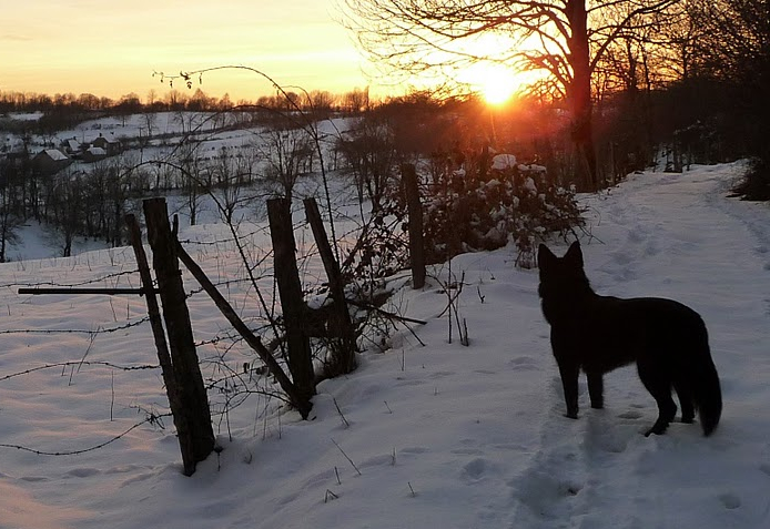 Plateau du Coyan à Raulhac ou à Giou sous-Montjou